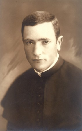 Márton Áron (1896-1980) katolikus püspök